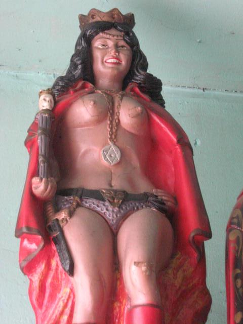 Pombagira Rainha das Sete Encruzilhadas